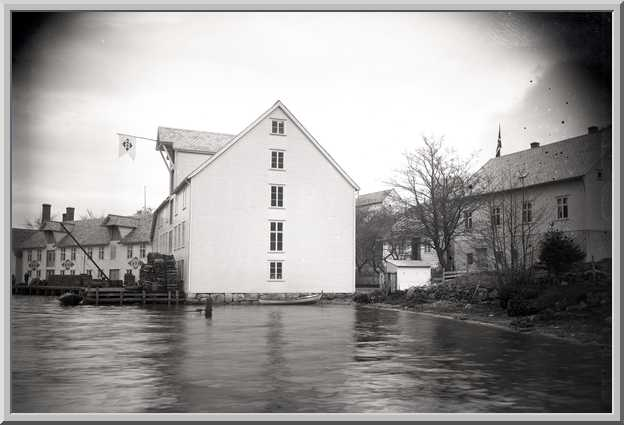 Bildet er i eie av min familie og jeg opphever herved enhver opphavsrett. Bildet er av hermetikkfabrikken i Uskedalen ca.1930